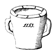 Zeichnung eines in den 1830er gefundenen archäologischen Fundstückes auf dem Feld nahe dem Dorf Steesow.